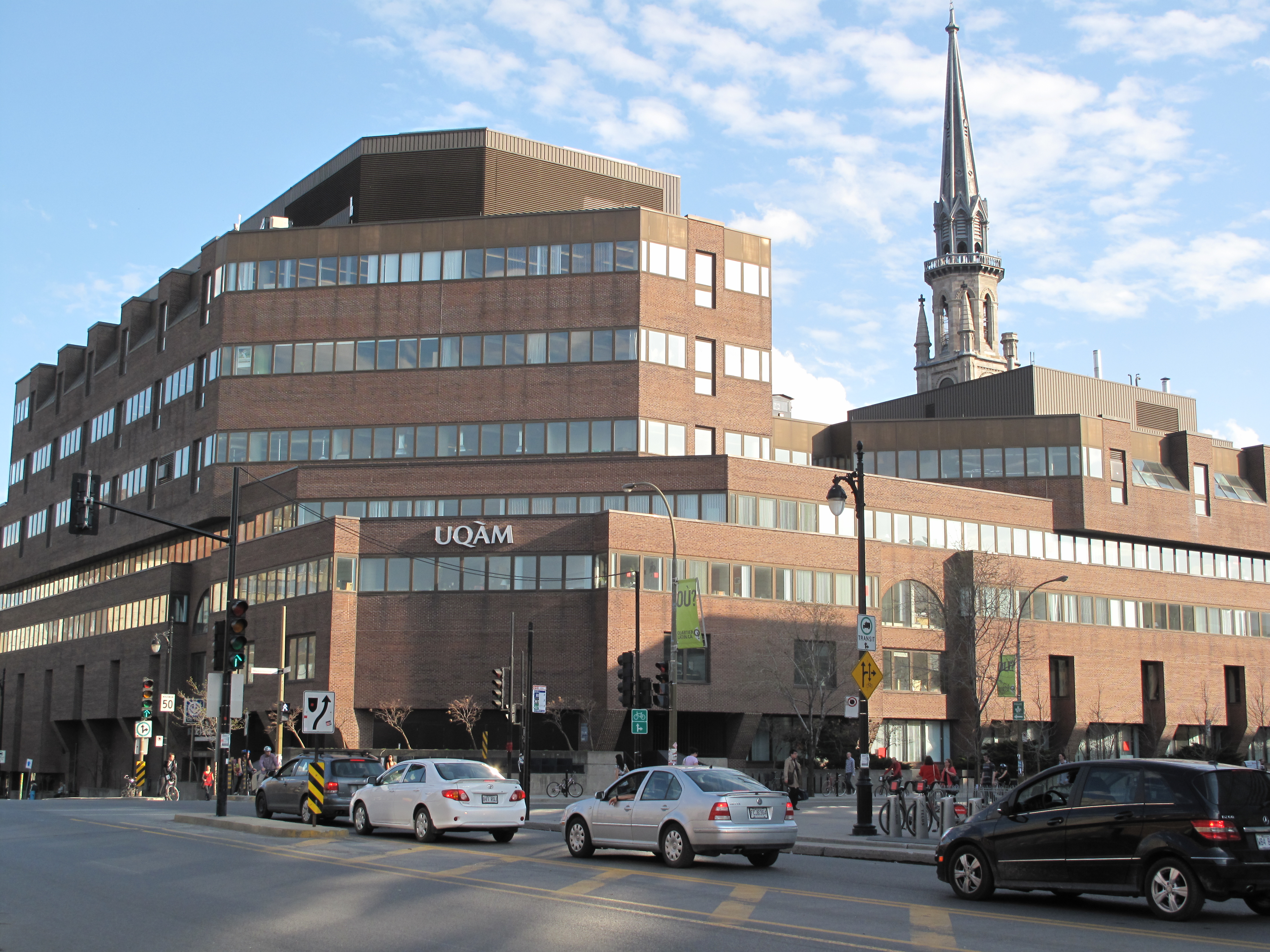 Montréal UQÁM